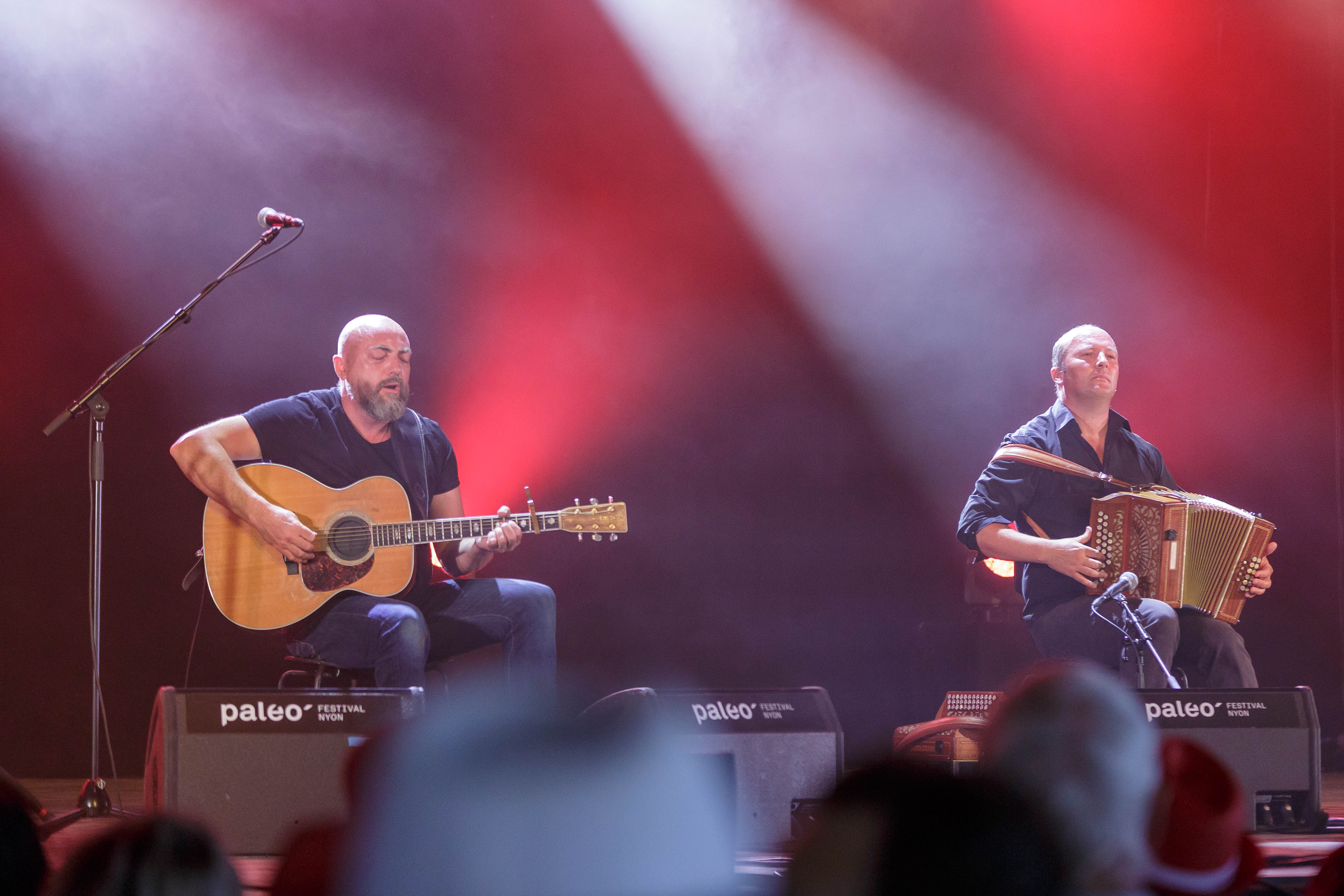 Paléo Festival Nyon, édition 2016, 19-24 juillet 2016. Jeudi 21: Les Frères Guichen (folk breton, France)